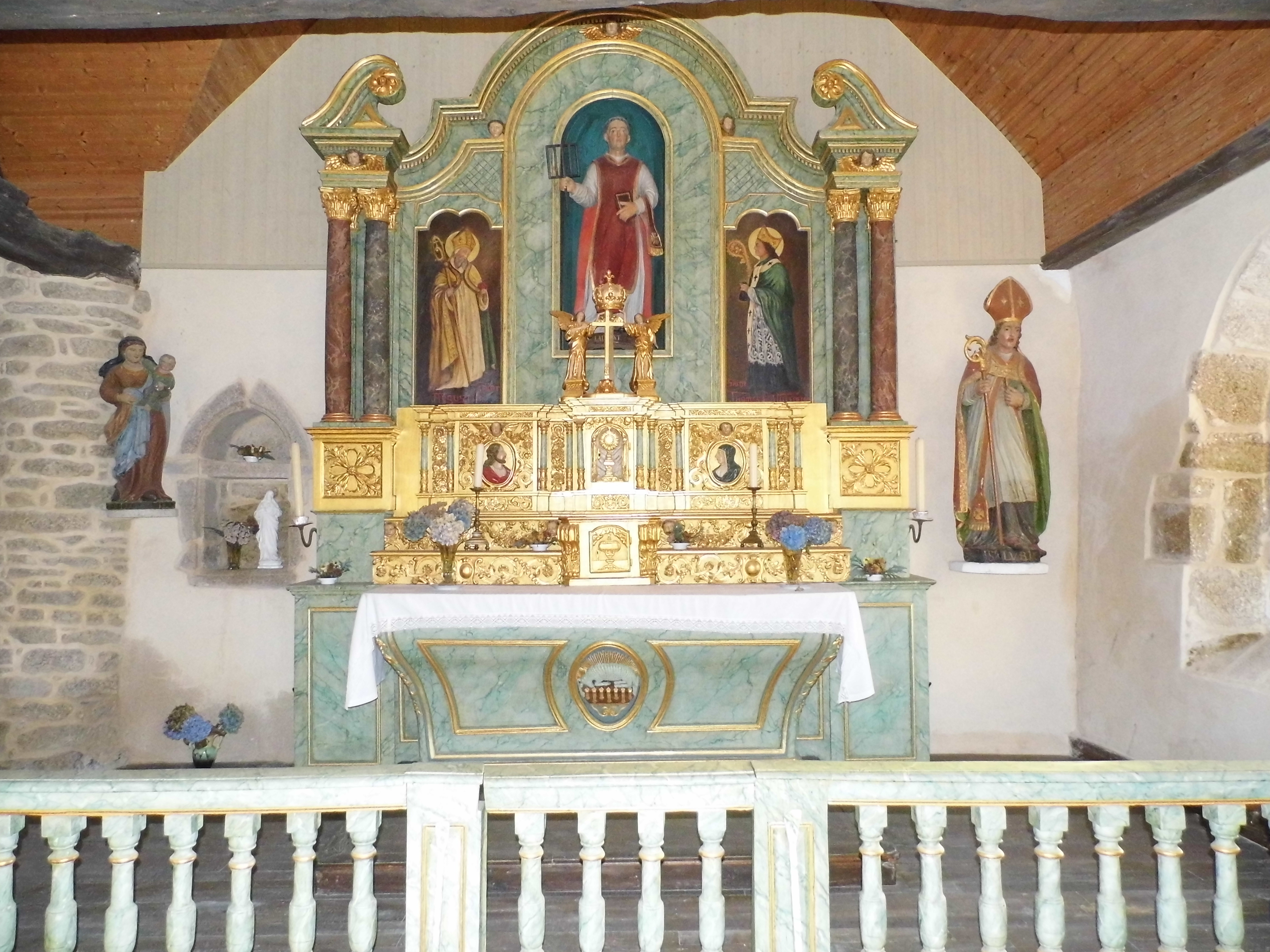 Plémy (Côtes-d'Armor, France), chapelle St Laurent, retable daté de 1676 rénové en 1996.